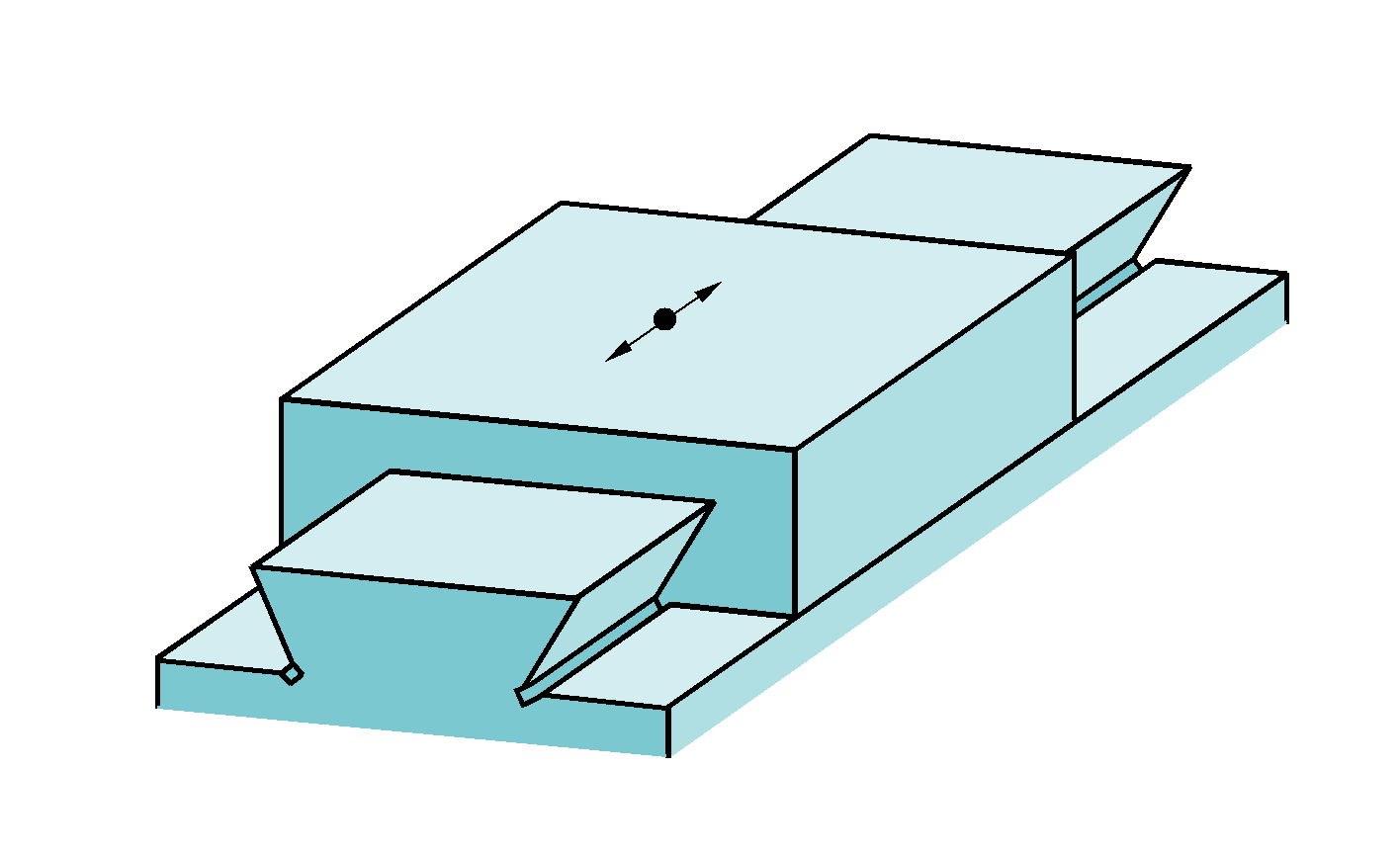 Prowadnica ślizgowa typy jaskółczy ogon